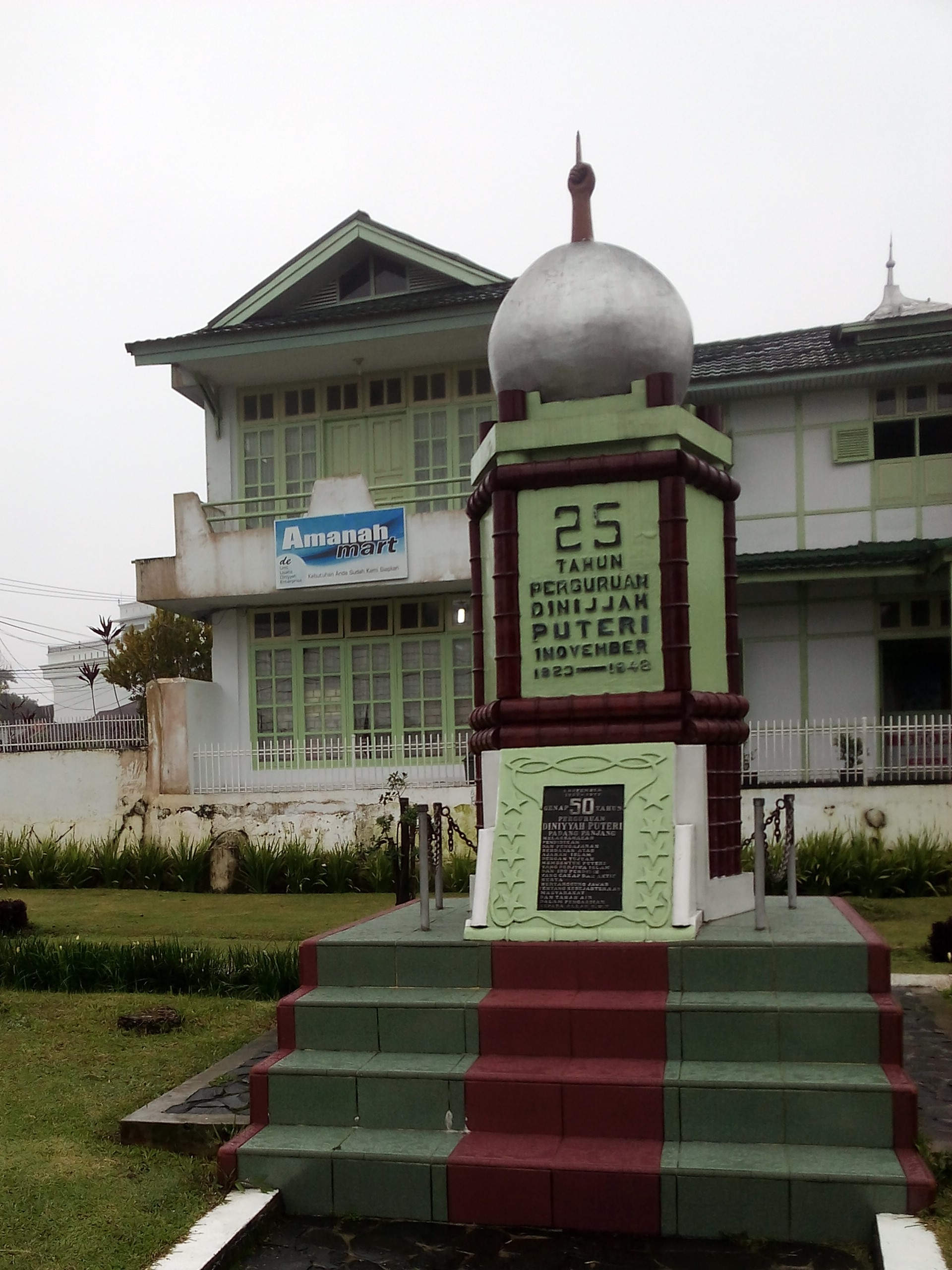 Tugu peringatan 25 tahun dan 50 tahun perguruan Diniyyah Putri